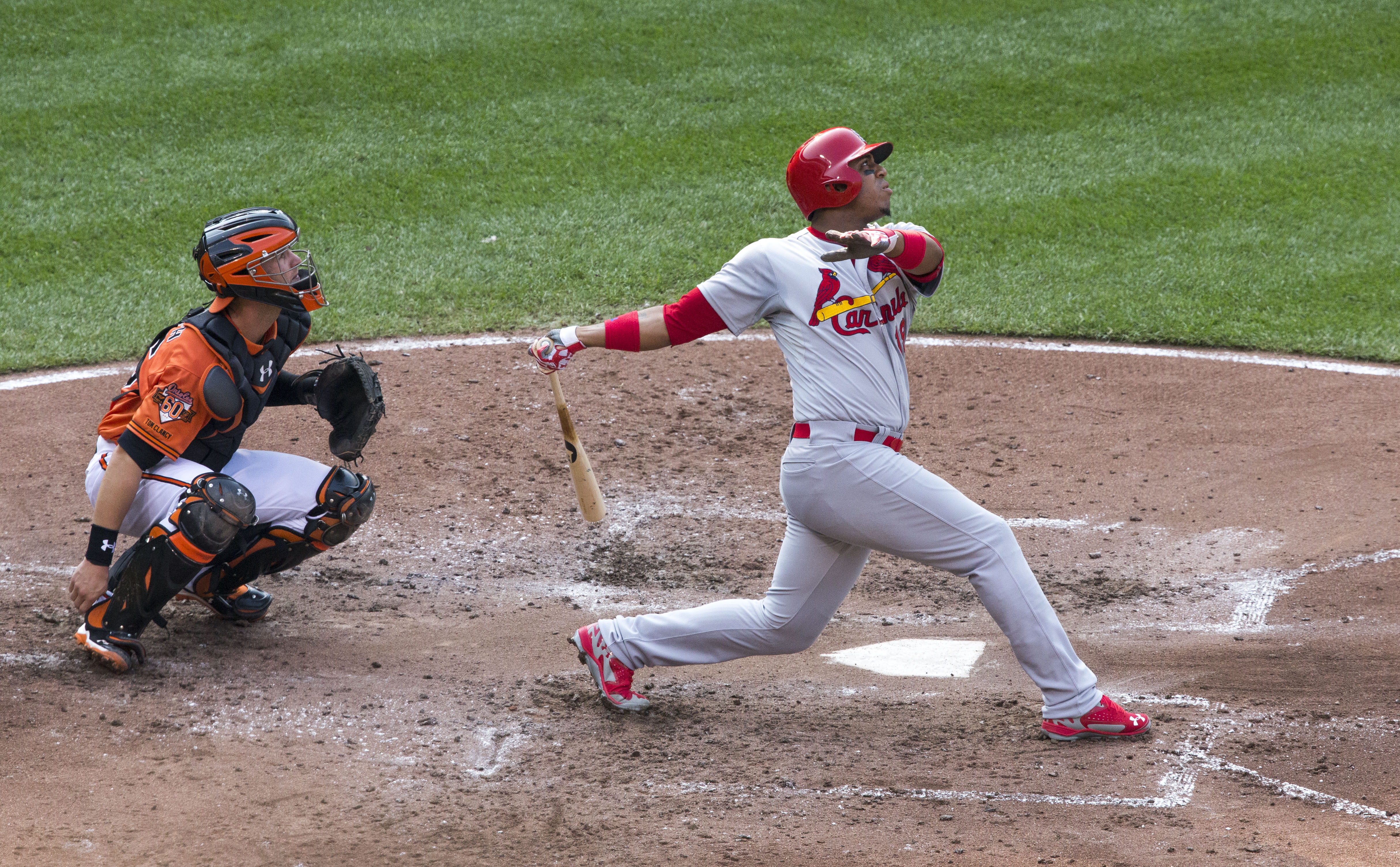 Cardinals at Orioles 8/9/14